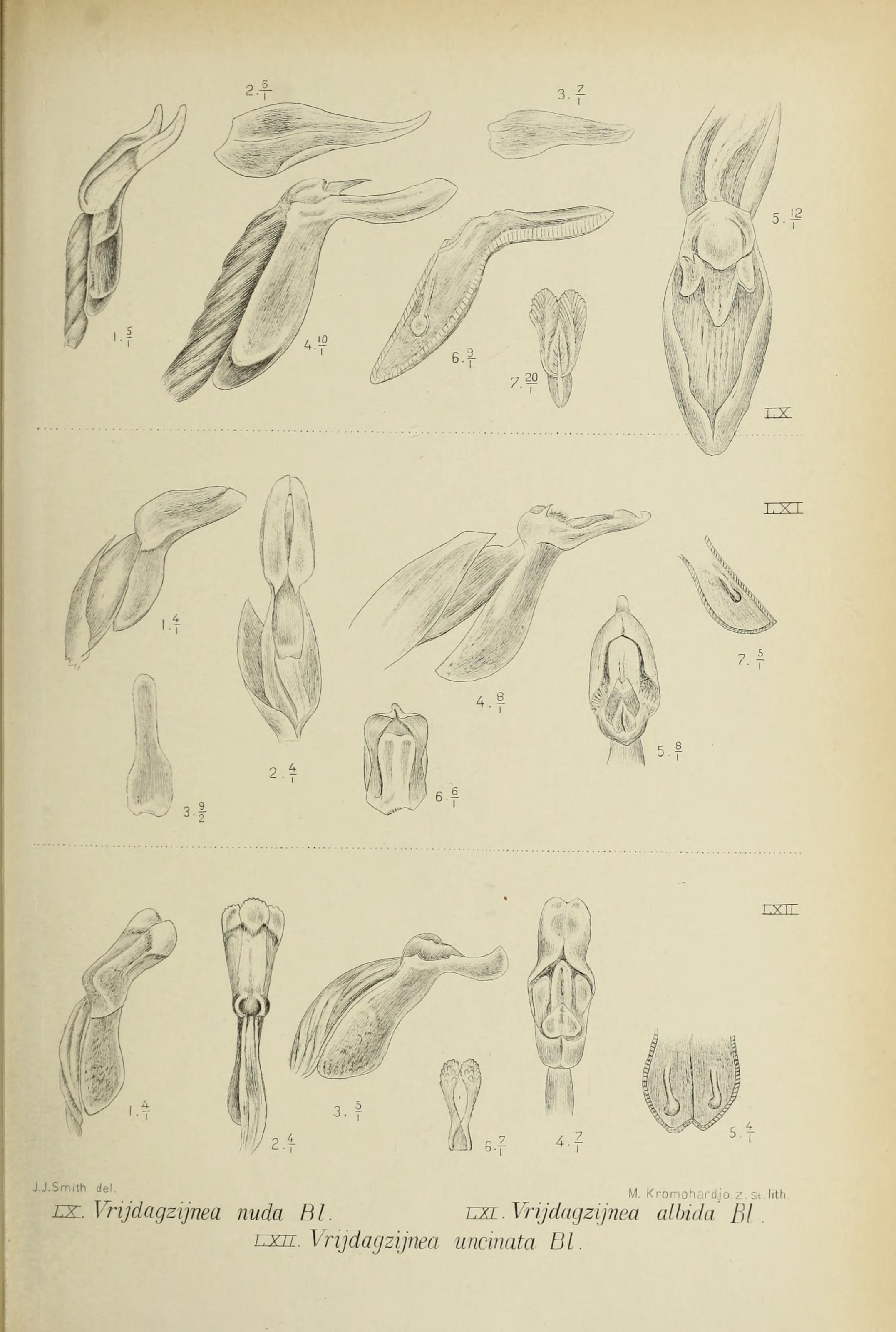 5m,m ael M. Kromohardjo.z.st.lith lzl. Vrijdagzijnea nuda Bl. un.Vrijdagzijnea albida Bl nzn. Vrijdayzijnea unänata Bl.